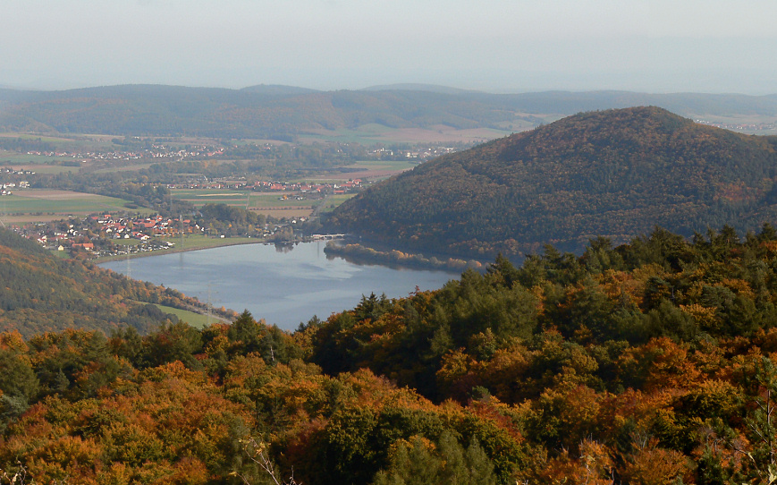 Der Affolderner See vom Peterskopf aus gesehen. Blickrichtung ist Ost. Rechts der Rabenstein. Vorn links am Seeufer Affoldern, in der Bildmitte Mehlen, hinten links Bergheim, am linken Bildrand Lieschensruh, in der Bildmitte hinten rechts das Gewerbegebiet Edertal. Im Hintergrund die bewaldete Kette des Alten Walds.